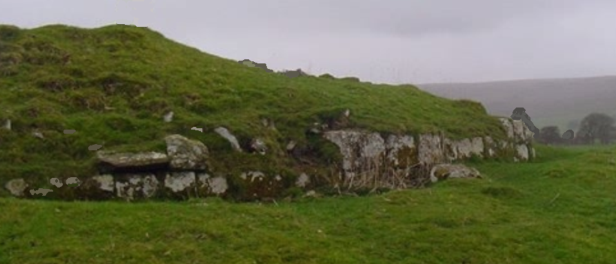 Reste der NO-Ecke des Kastell Habitancum (Risingham), GB.